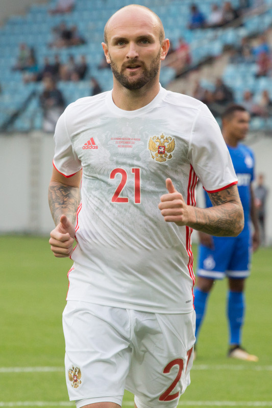 Россия - «Динамо»